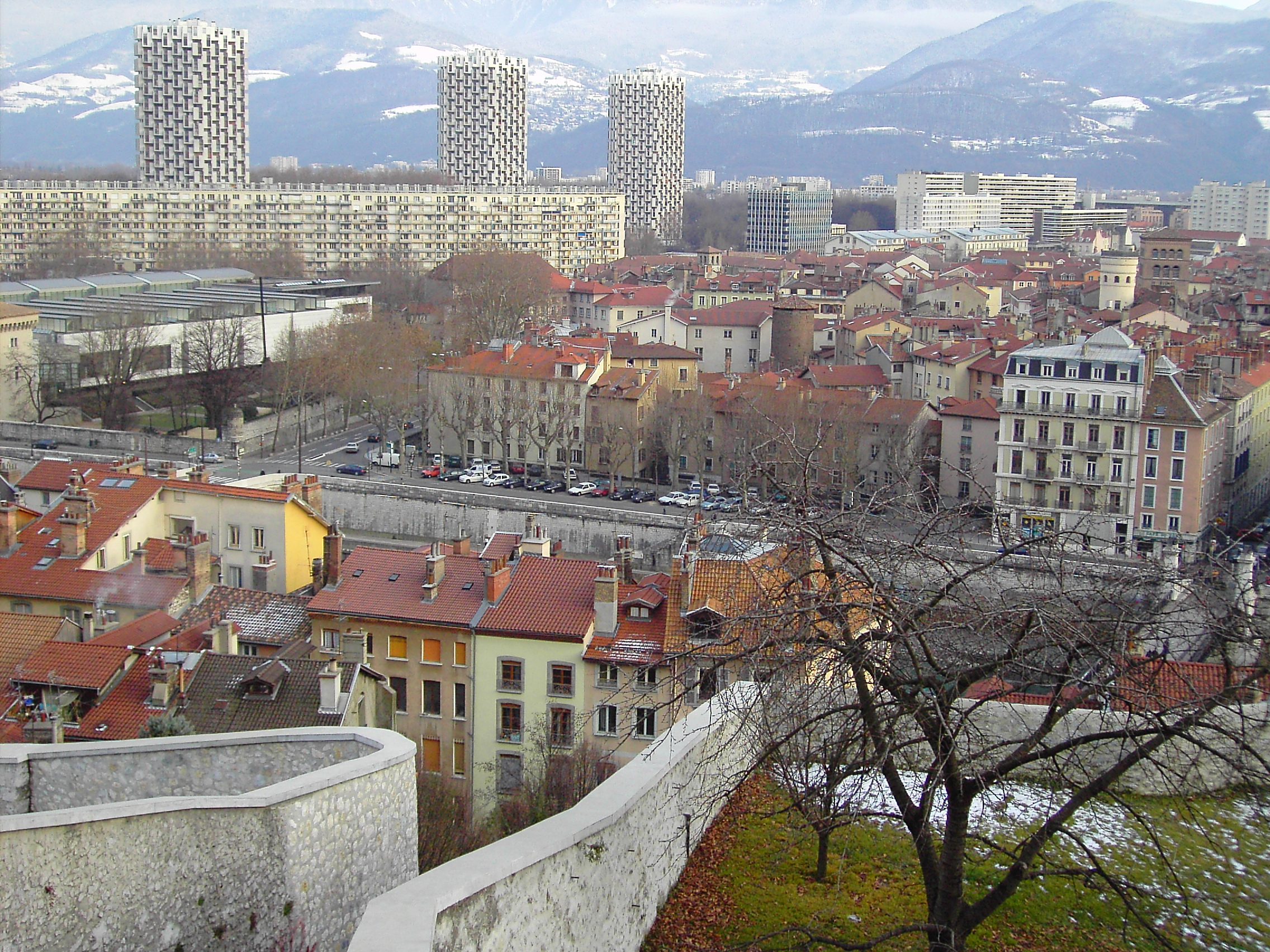 Les 3 tours derrière l'immeuble en S et le centre de Grenoble à droite